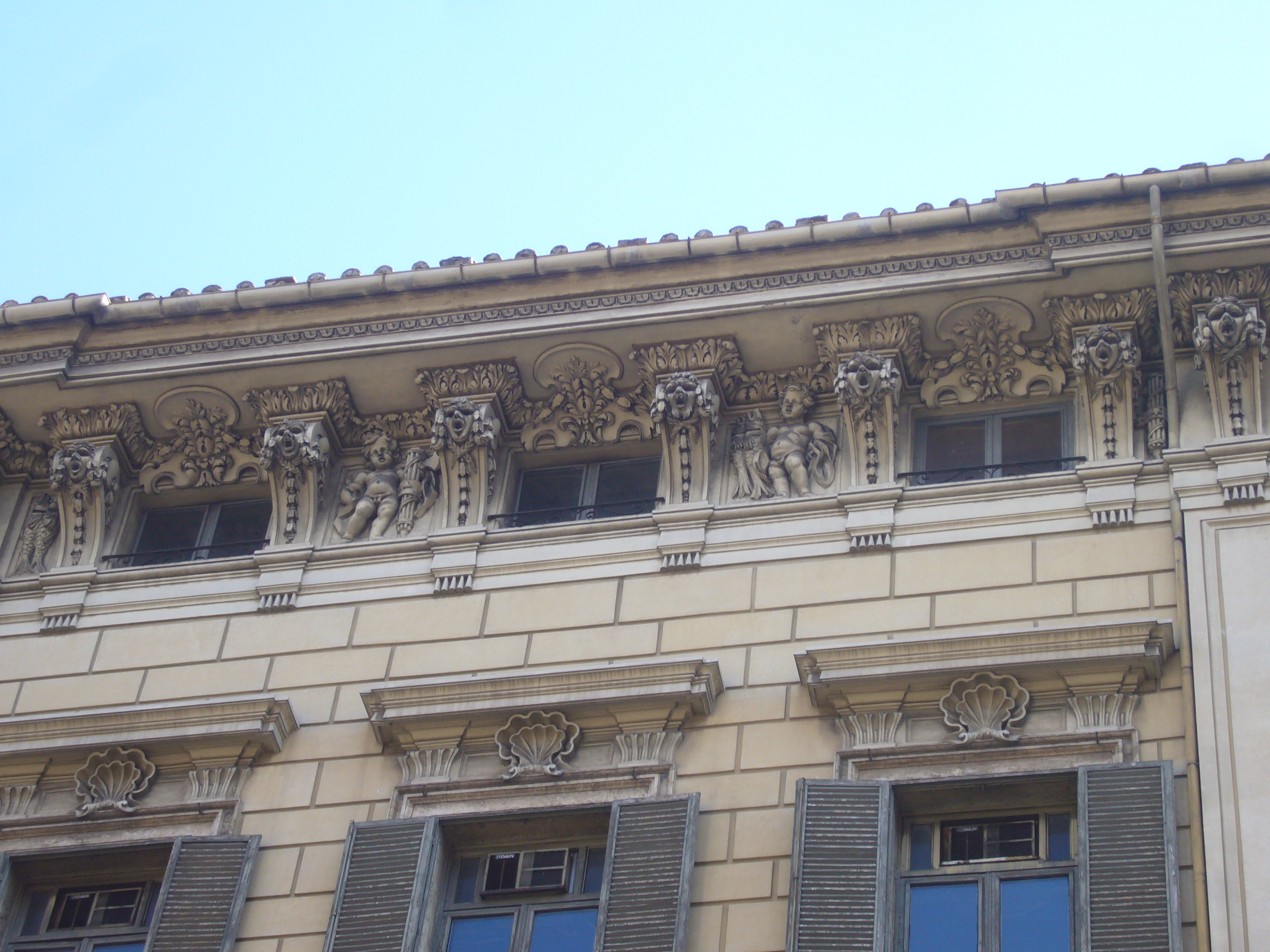 Roma, palazzo Mancini-Salviati a via del Corso. Cornicione.